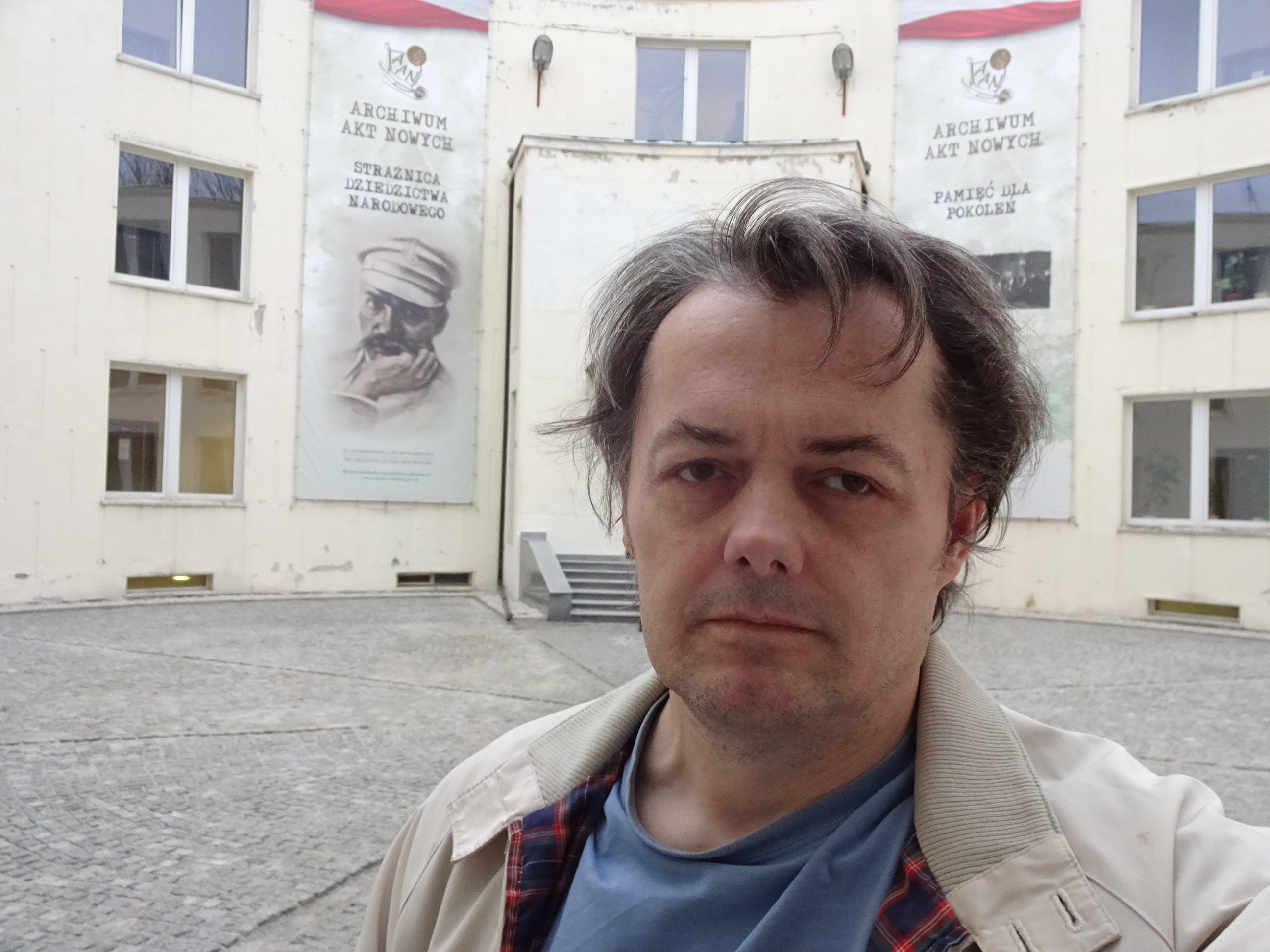 wizyta w AAN 27 marca 2018